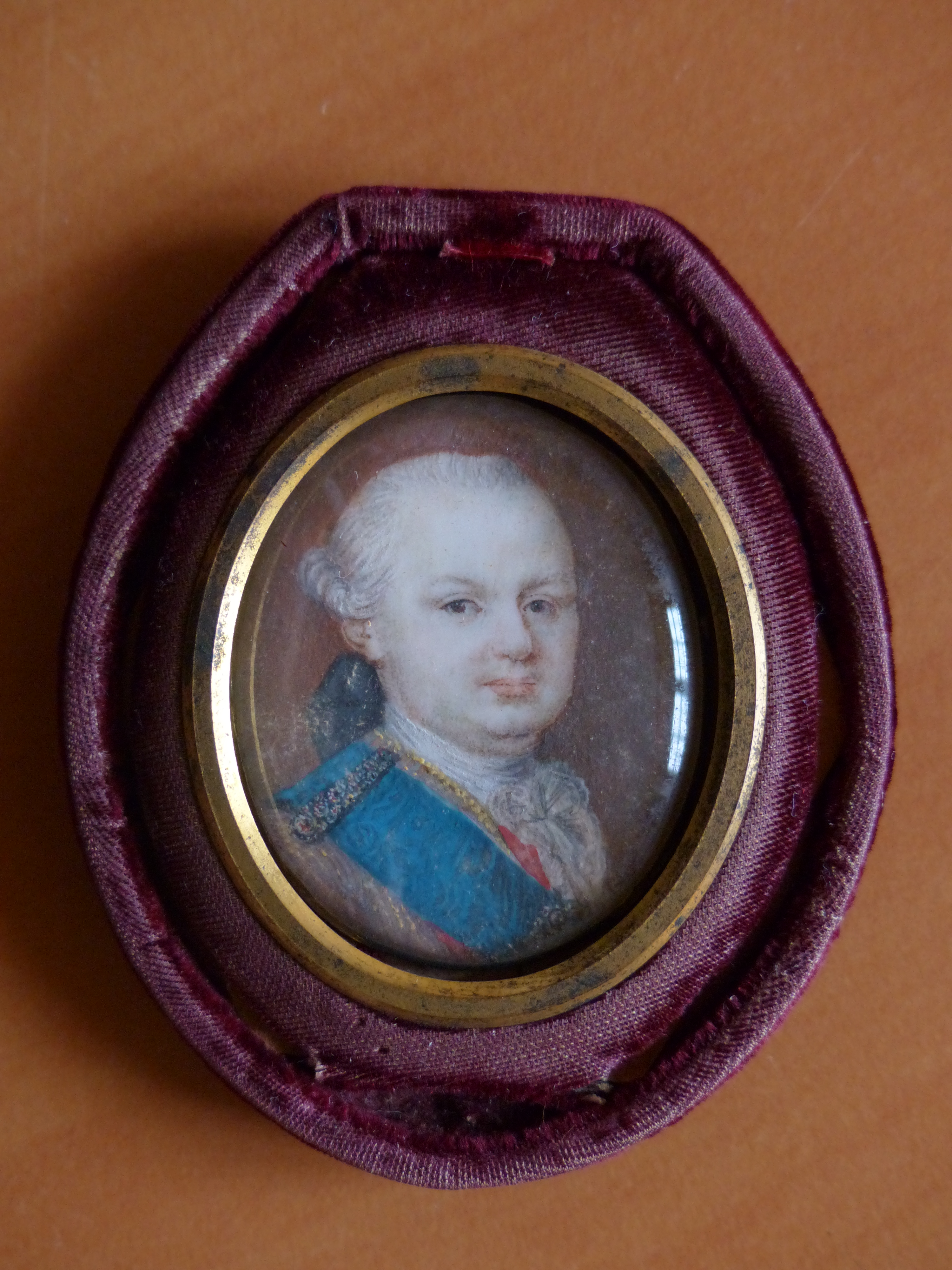 Portrait du duc de Parme offert par lui-même à Louis-Agathon de Flavigny, ministre plénipotentiaire à Parme de 1772 à 1793